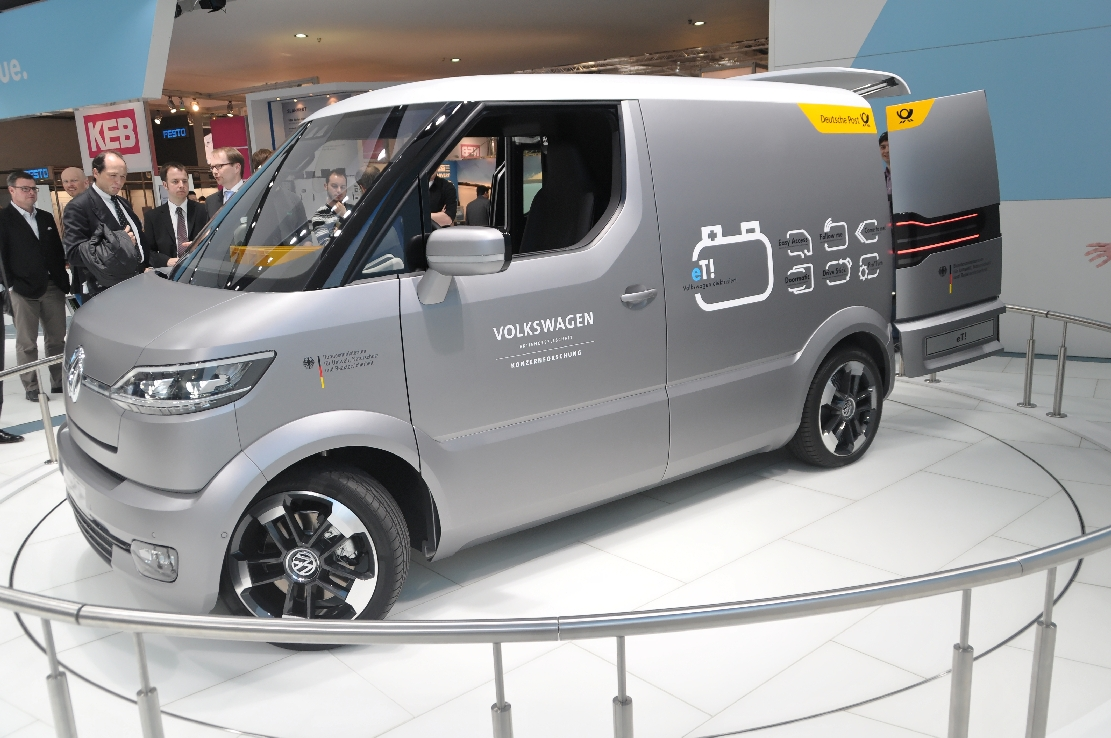 Hannover-Messe April 2012 Dieses Foto entstand durch die Mithilfe des gemeinnützigen Vereins Skillshare bei der Akkreditierung als Fotograf. Infos unter skillshare.eu Skillshare e.V. ist ein eingetragener gemeinnütziger Verein zur Förderung der Bildung durch Unterstützung der Erstellung, Sammlung und Verbreitung so genannten freien Wissens. IBAN: DE16 8306 5408 0004 8850 66 BIC: GENODEF1SLR Bank: VR-Bank Altenburger Land